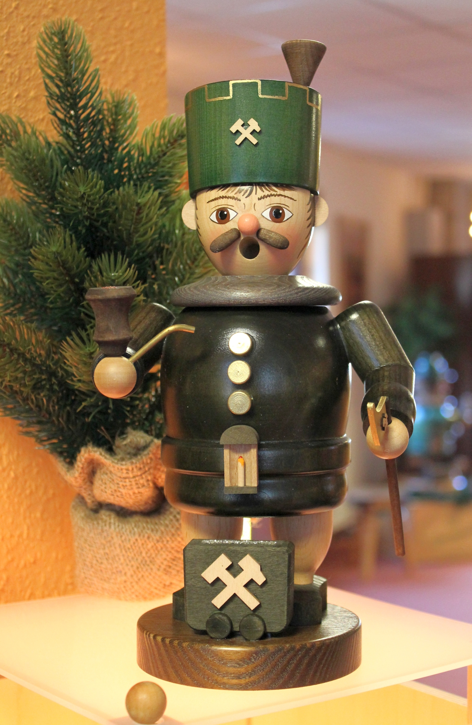 Räuchermännchen im Räuchermännchenmuseum Crottendorf, Sachsen, Deutschand.